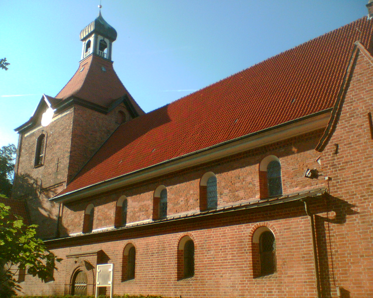 Südseite der Johanniskirche in Oldenburg in Holstein.